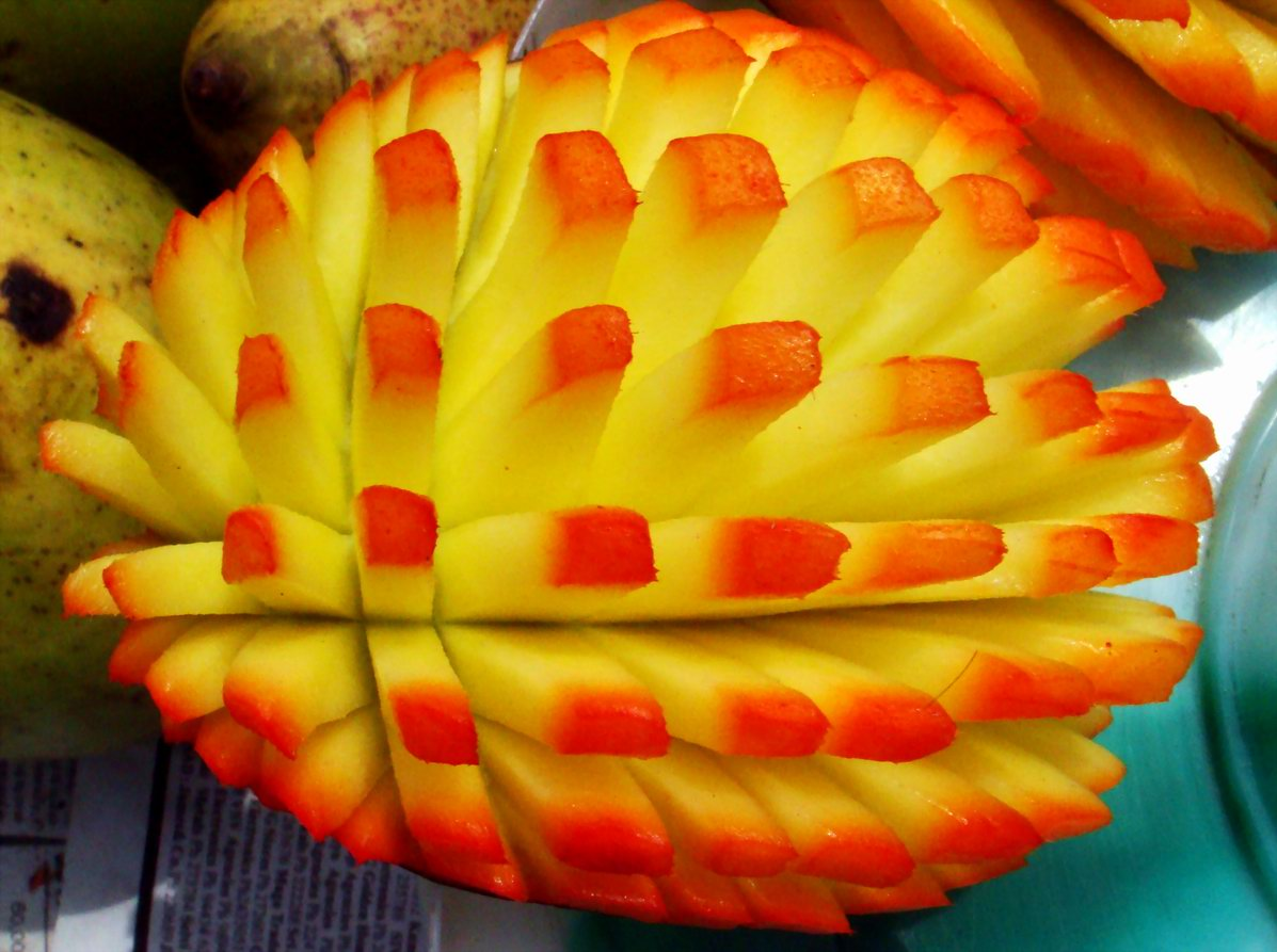 മാങ്ങ-മുള്ളൻ‍പന്നി